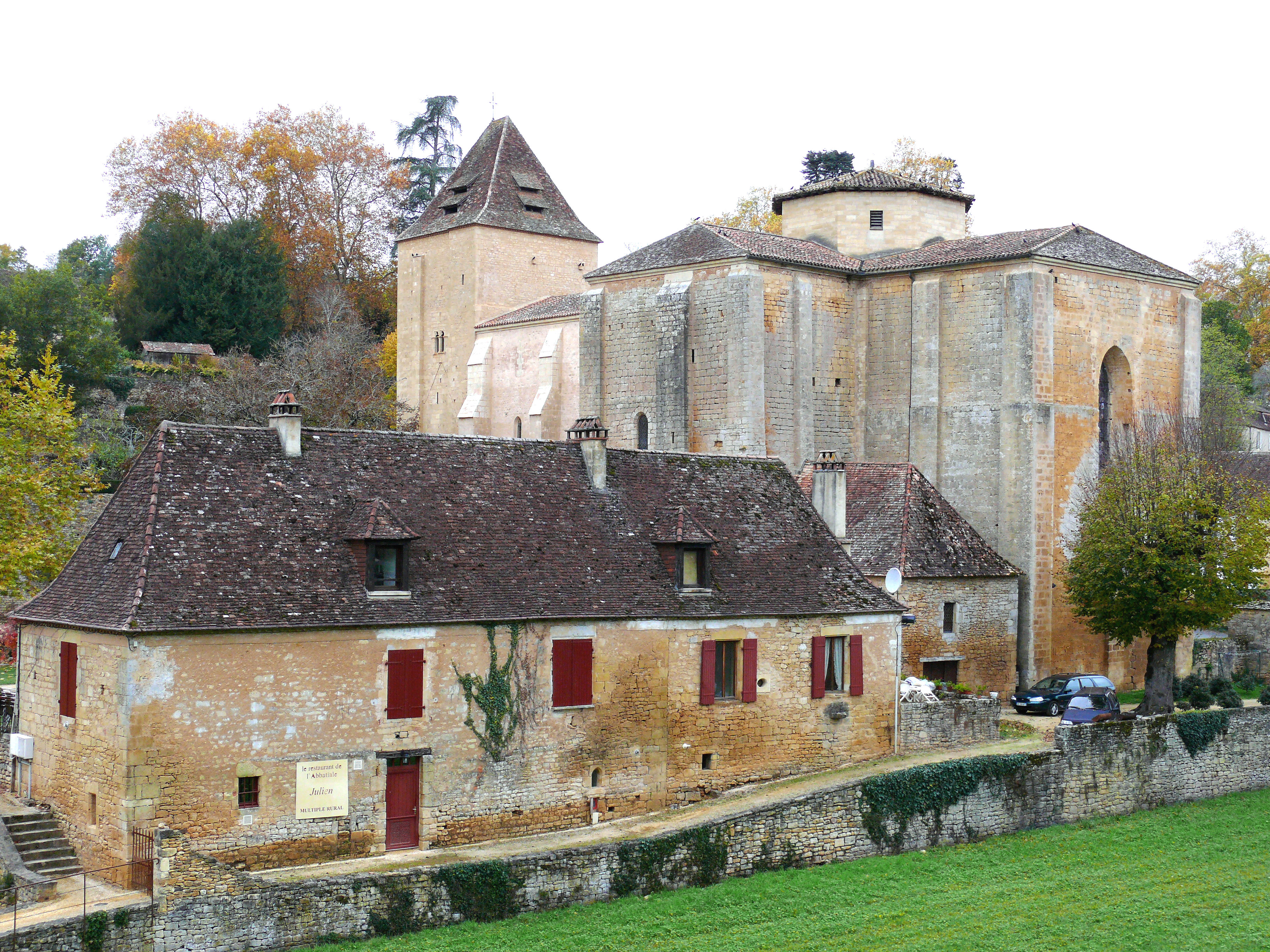 Paunat - Église Saint-Martial - Ensemble du site